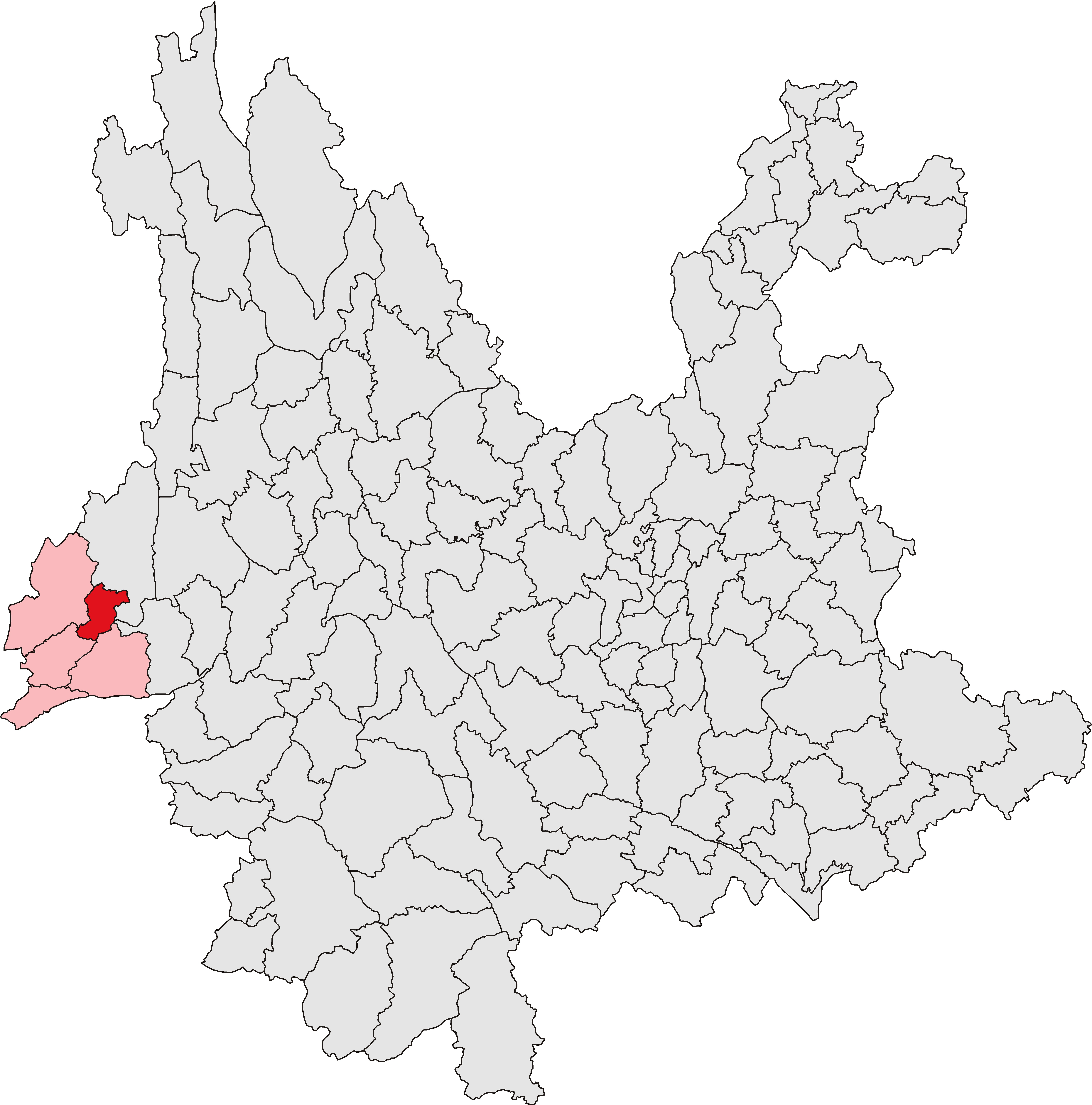 中文（中国大陆）: 梁河县位置图